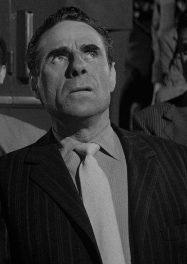 scena dal film Un americano a Roma